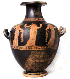 Oinochoe attica a figure rosse